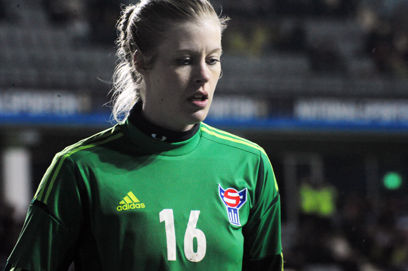 Faroe Islands goalkeeper Randi Wardum